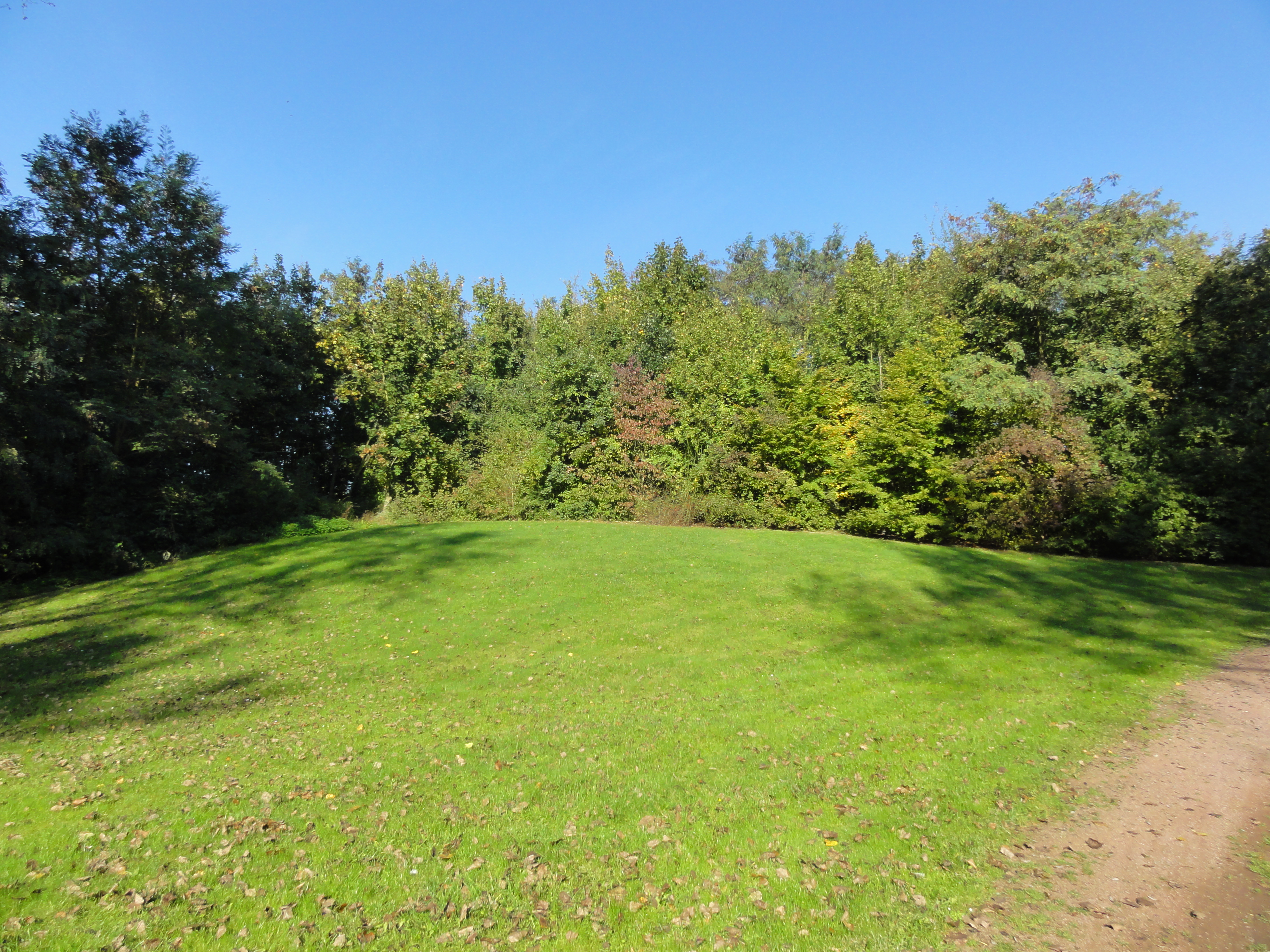 Terril n° 211 dit 3 d'Oignies, Fosse n° 3 de la Compagnie des mines d'Ostricourt, Libercourt, Pas-de-Calais, Nord-Pas-de-Calais, France.